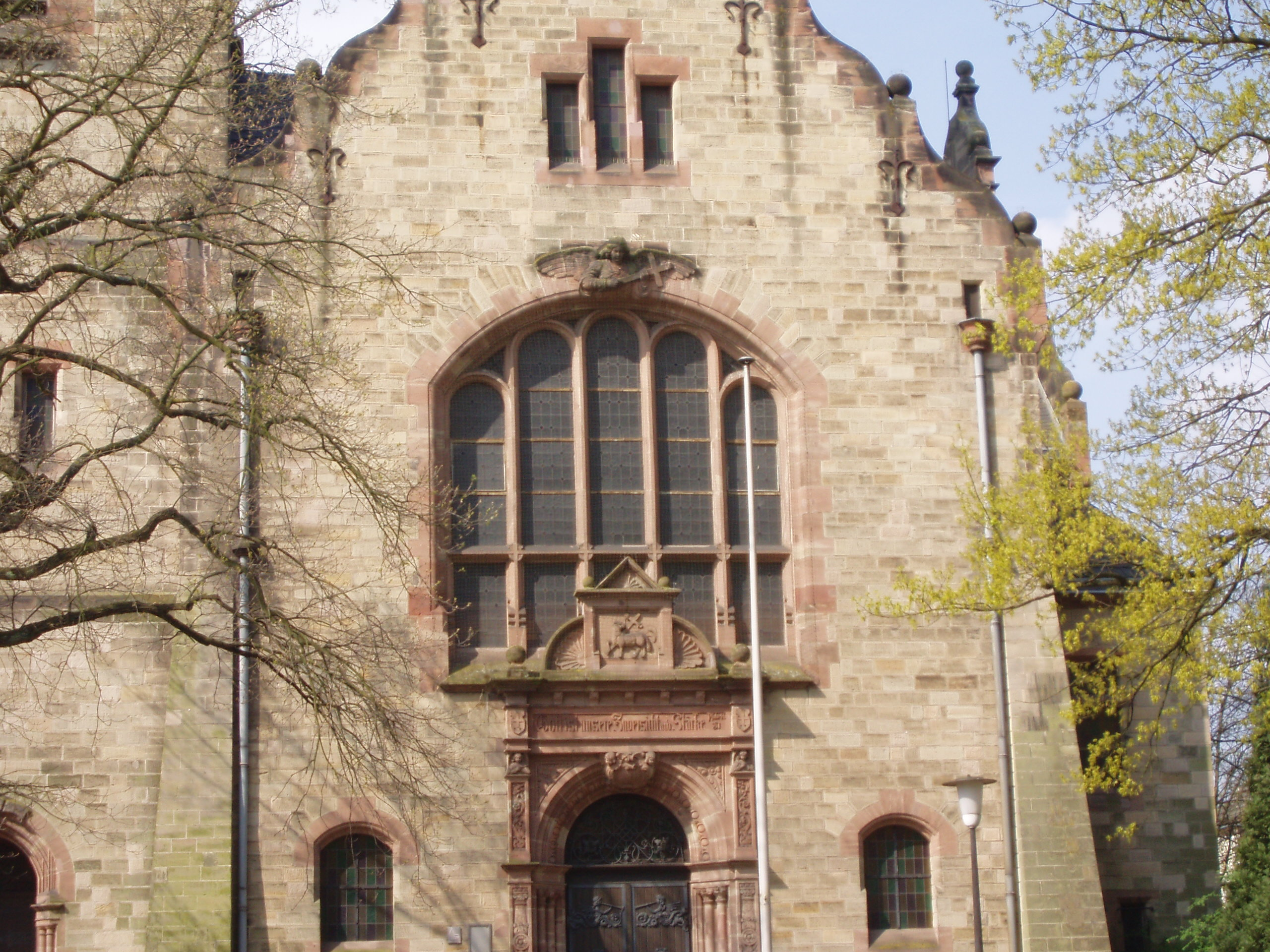 evangelische Pfarrkirche Saarlouis, Detail